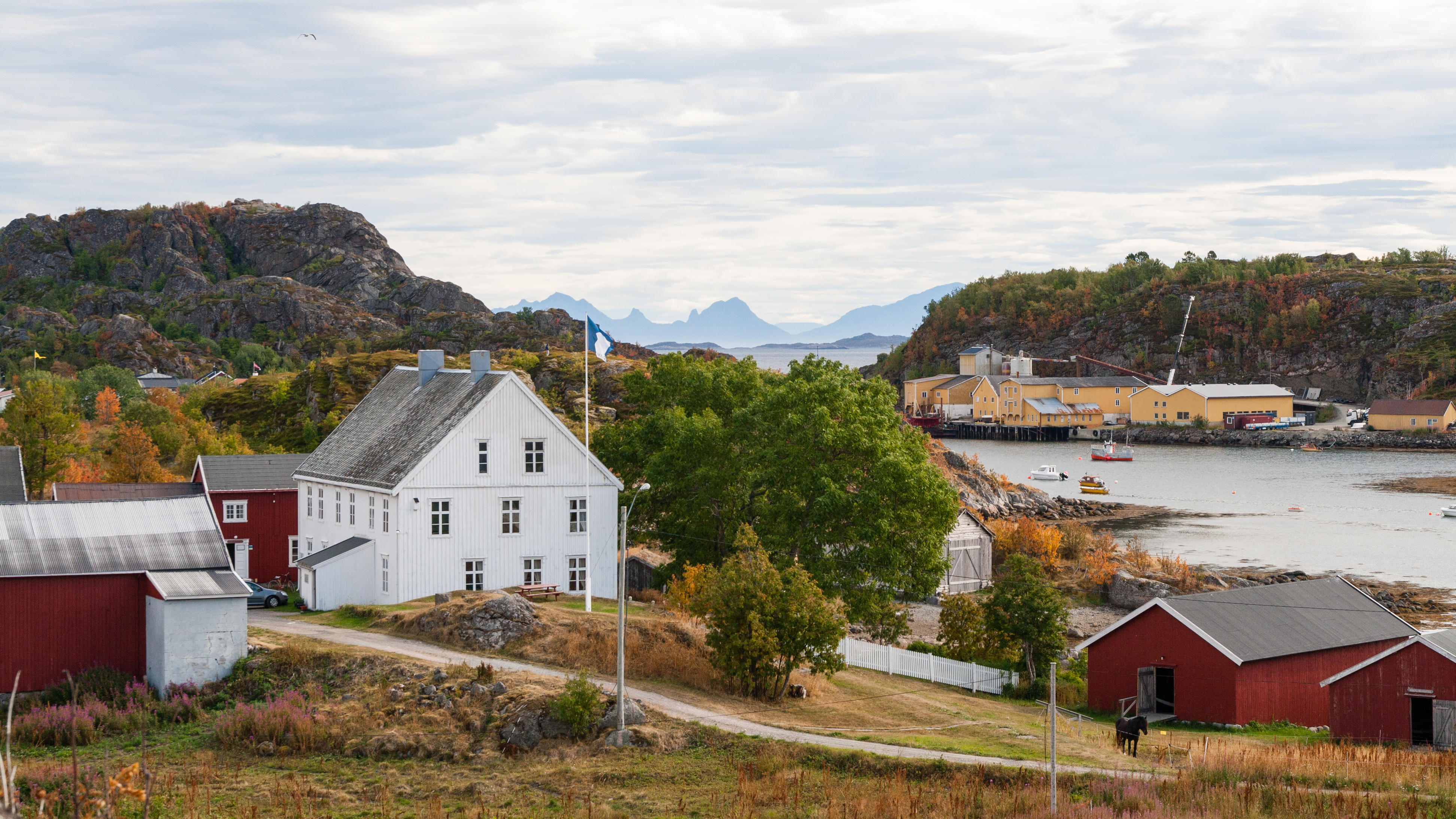 Lofoten Museum, Kabelvåg, Lofoten